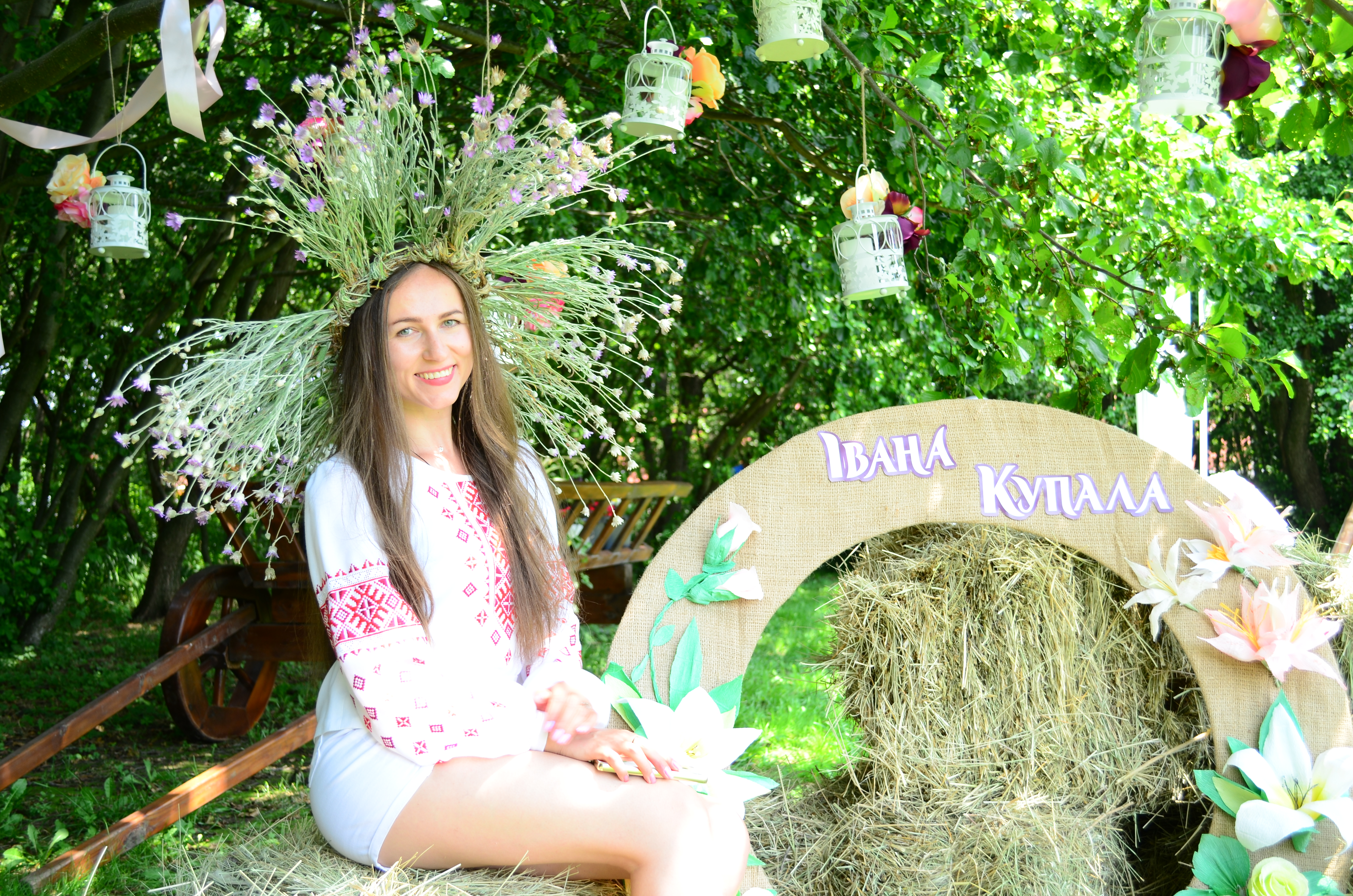 Свято Івана Купала